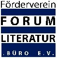 Logo des Forum-Literaturbüro e.V. in Hildesheim.